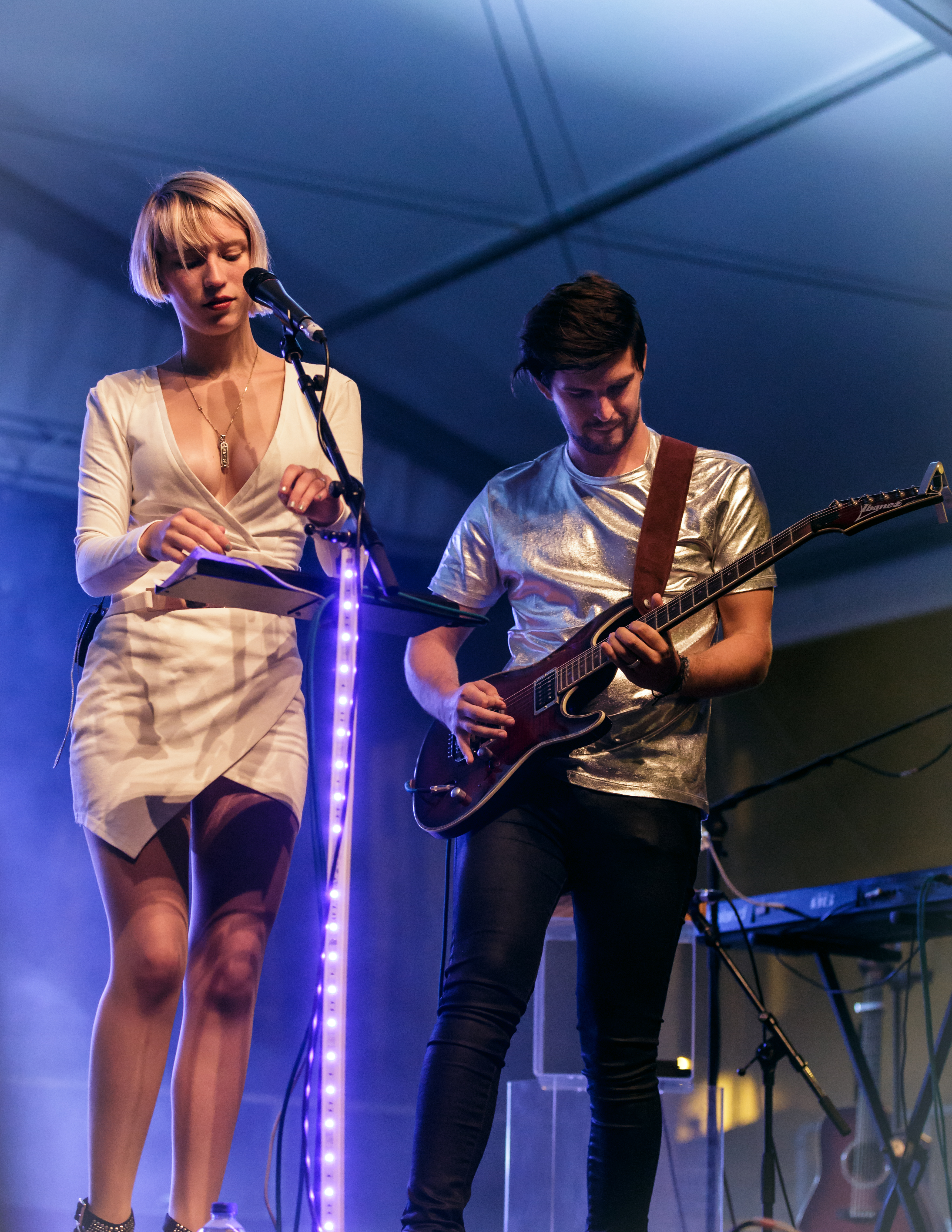 Laurène et Louis en concert au festival de Cornouaille à Quimper le 22 juillet 2016.